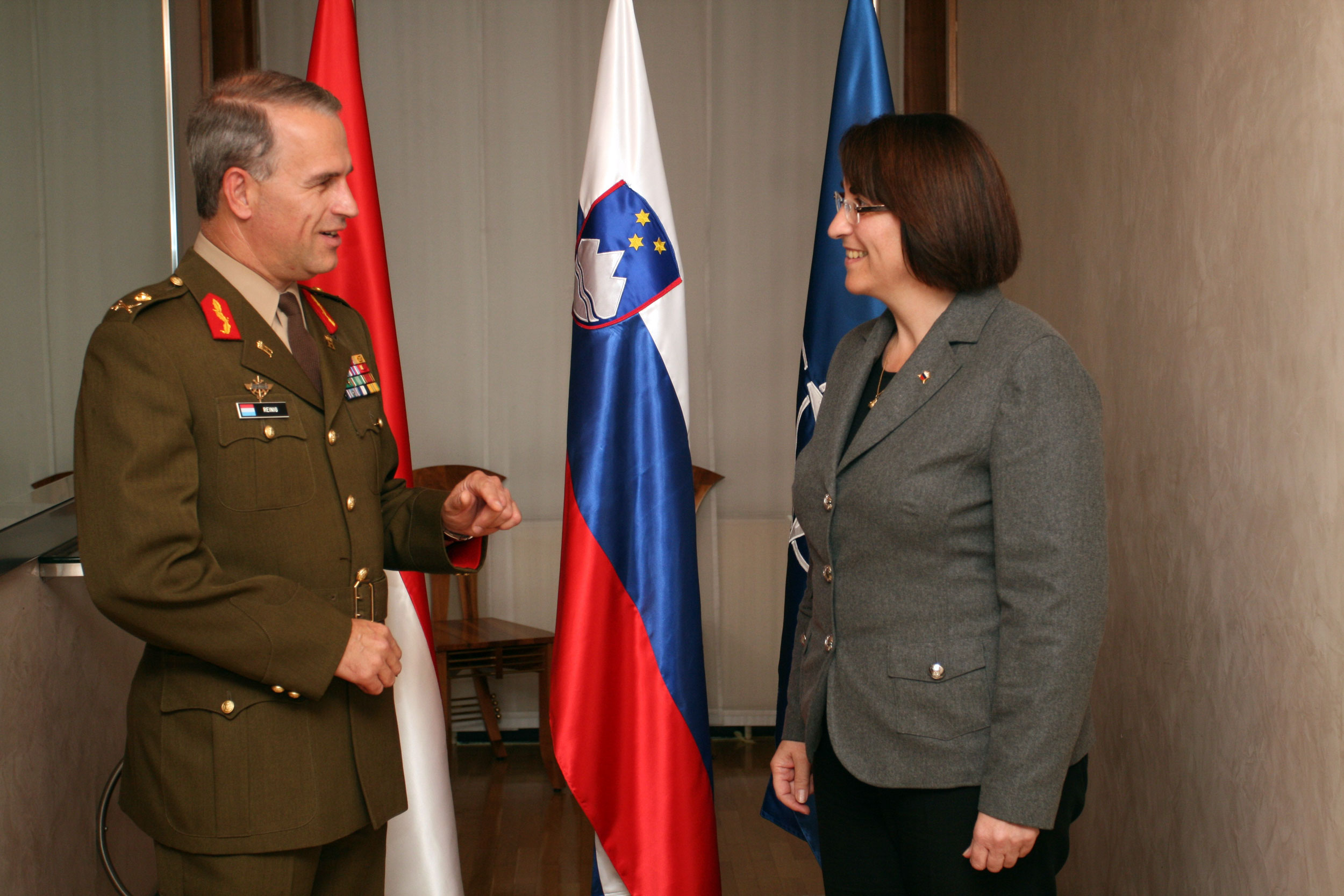 Generalmajor mag. Alojz Šteiner gosti luksemburškega kolega.